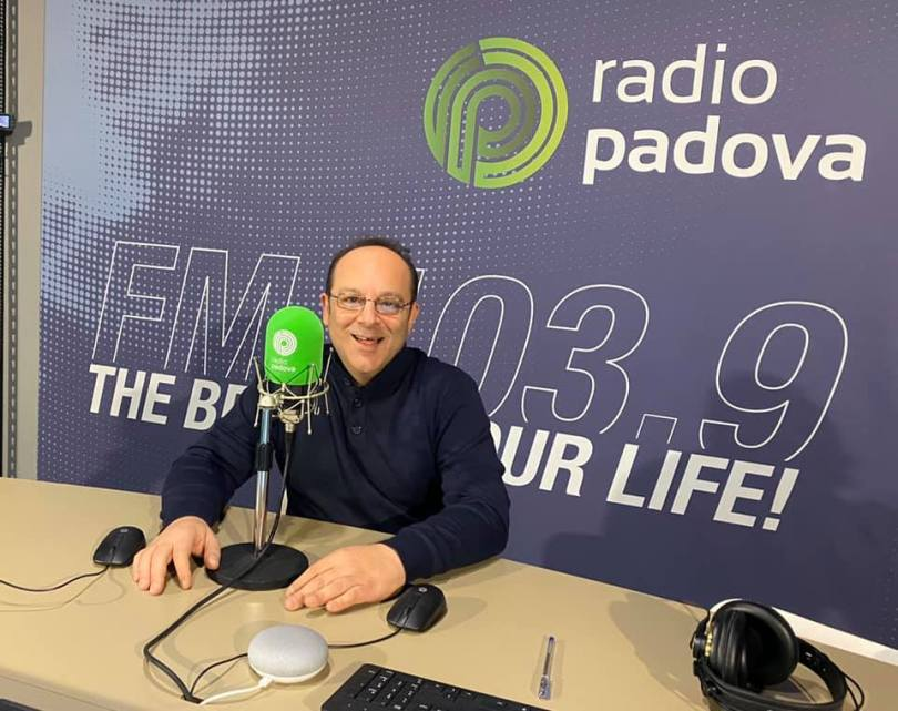 foto radio padova